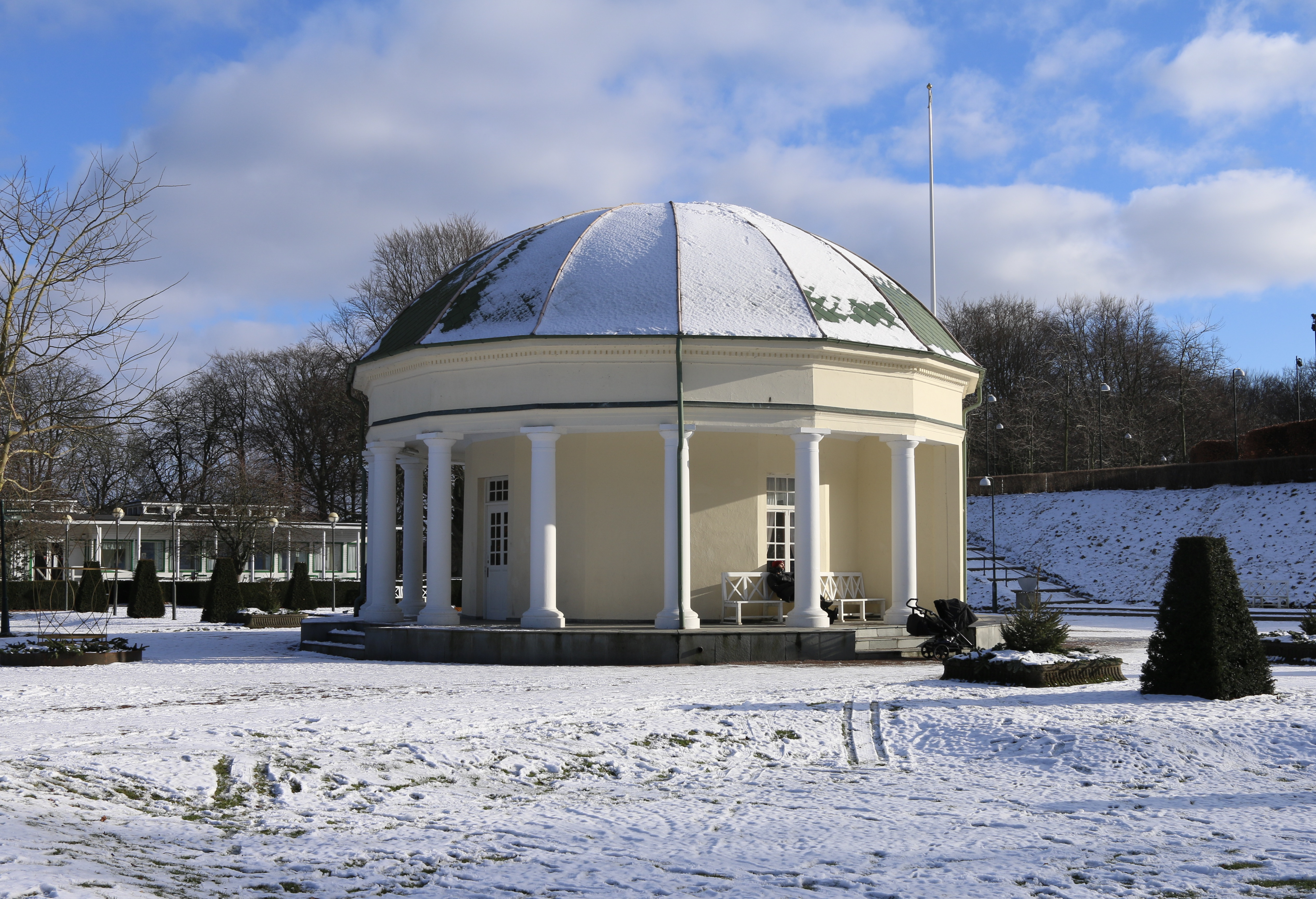 Margaretapaviljongen, Malmö, 2017